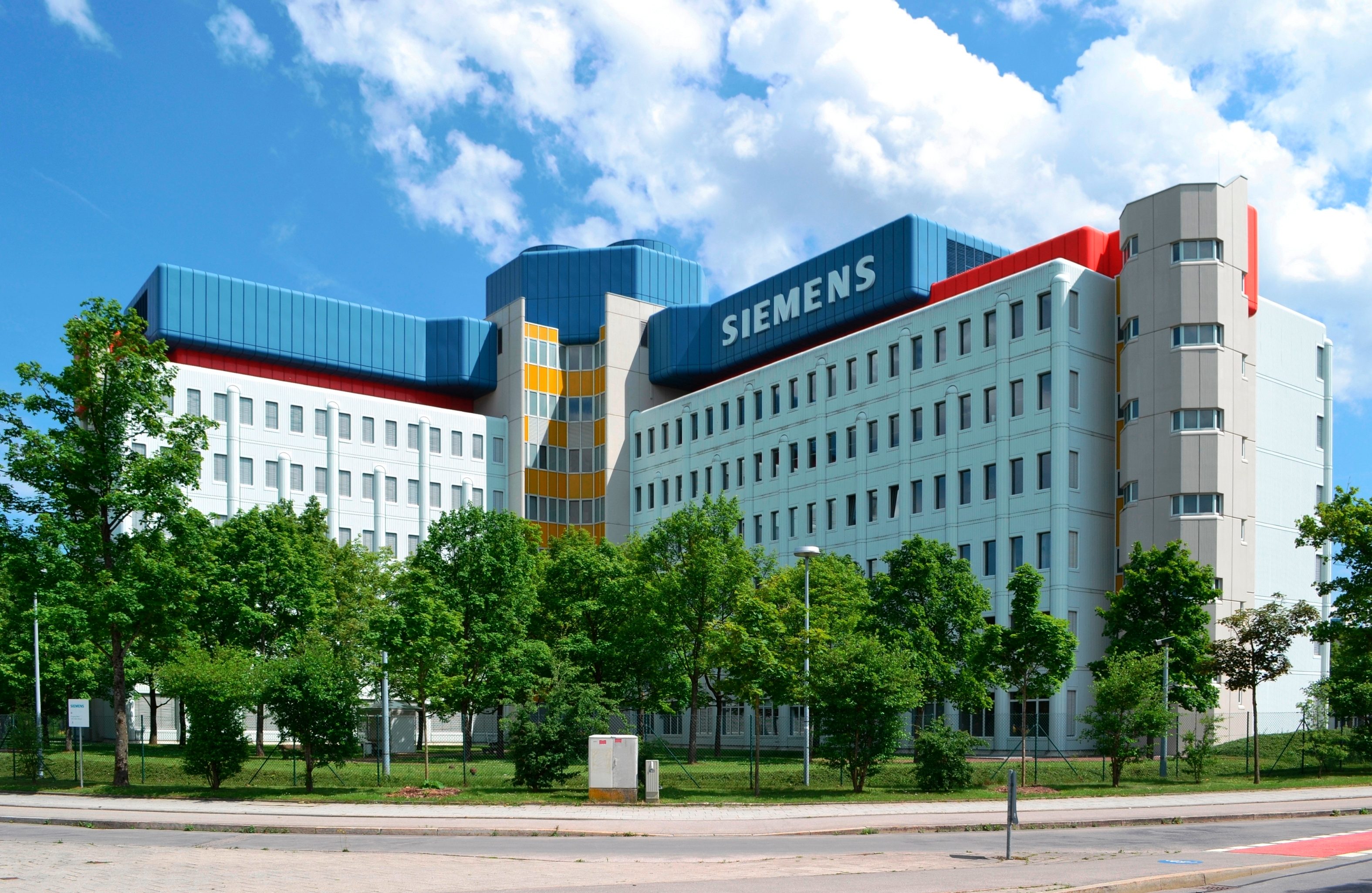 Gebäude der Siemens AG in Neuperlach-Süd.